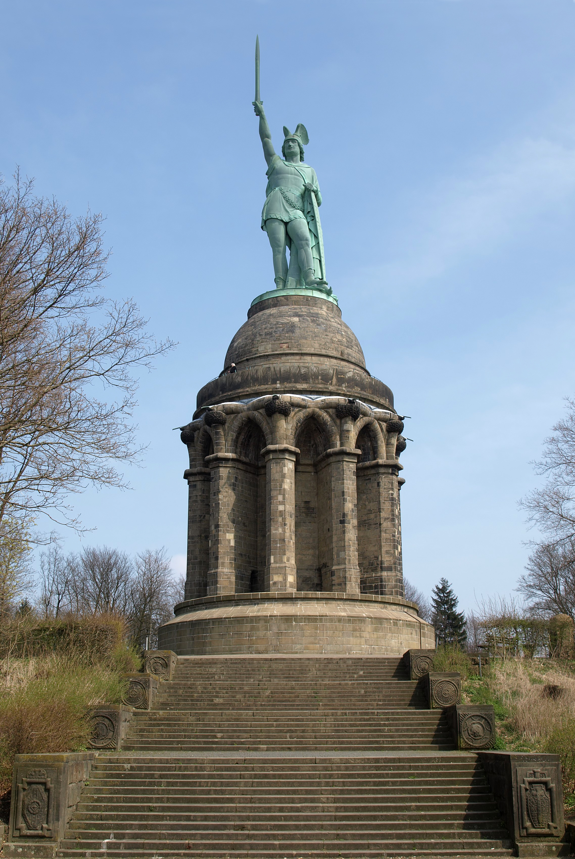 Blick auf das Hermannsdenkmal im Teutoburger Wald